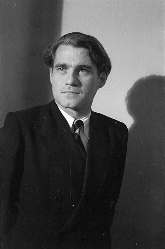 Original image description from the Deutsche Fotothek Aufnahmen von M. Friedrichs, M. Fischer, Hermann Matern, Arno Schellenberg und Frau, Frau Gret Palucca, Erich Ponto, Prof. Joseph Keilberth, Otto FalvayJoseph Keilberth